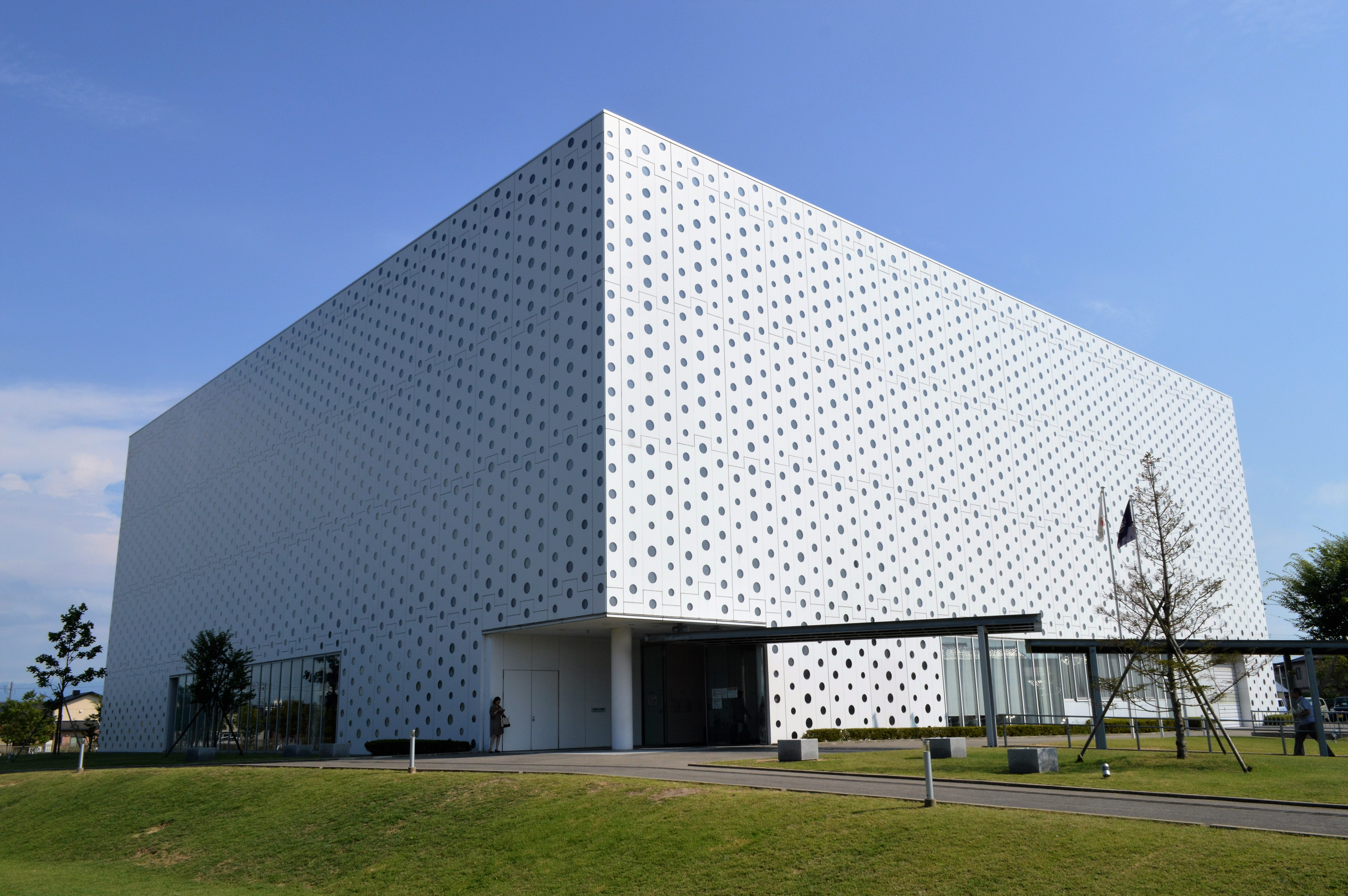 石川県金沢市 金沢海みらい図書館。金沢市図書館のひとつ。